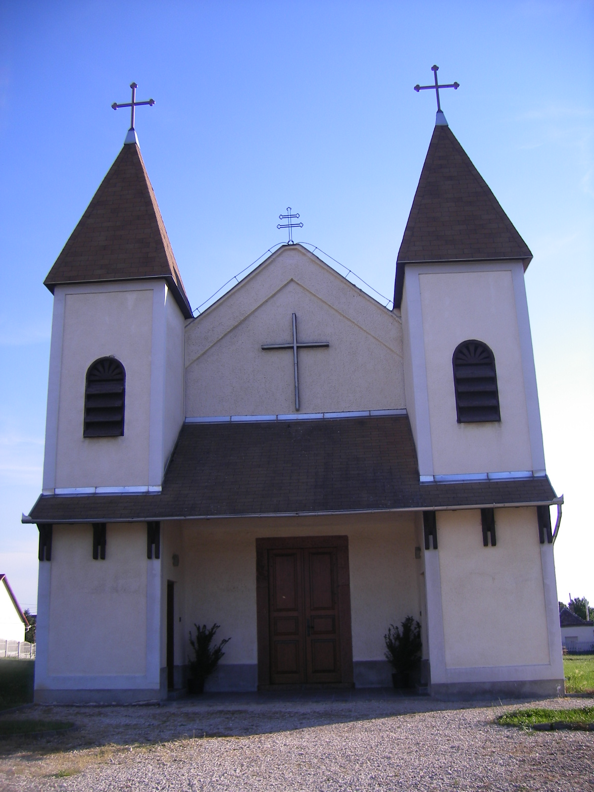 Naszály - Krisztus király római katolikus templom